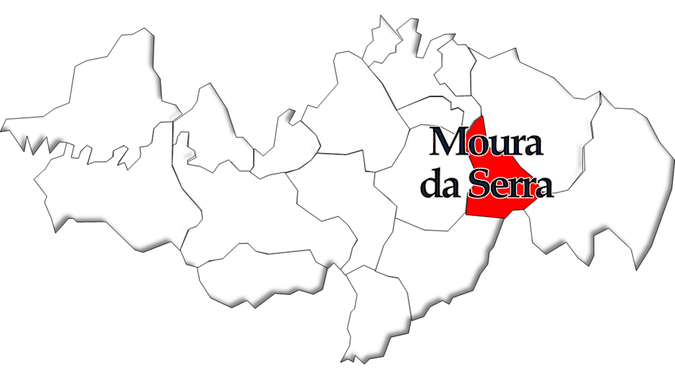 População